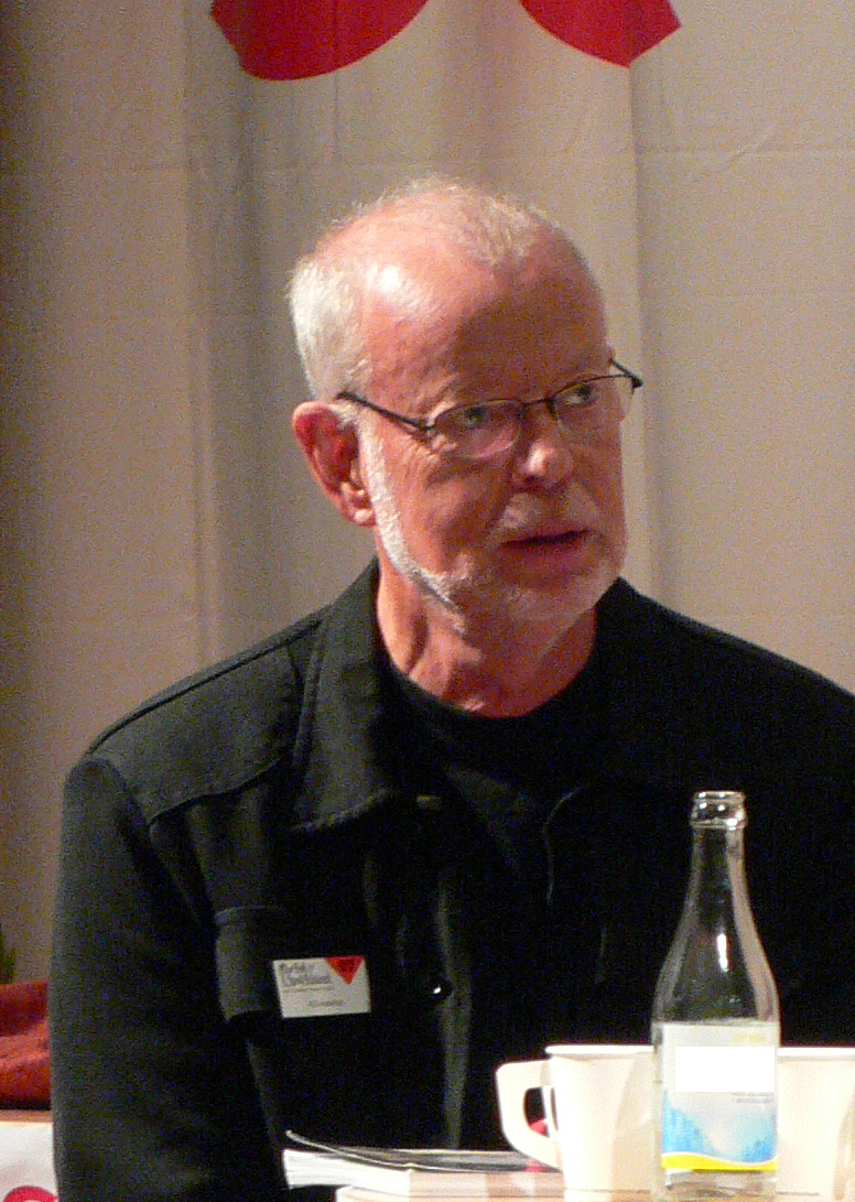 K.G. Hammar at Gothenburg Book Fair 2007, K.G. Hammar på Bok- och biblioteksmässan 2007